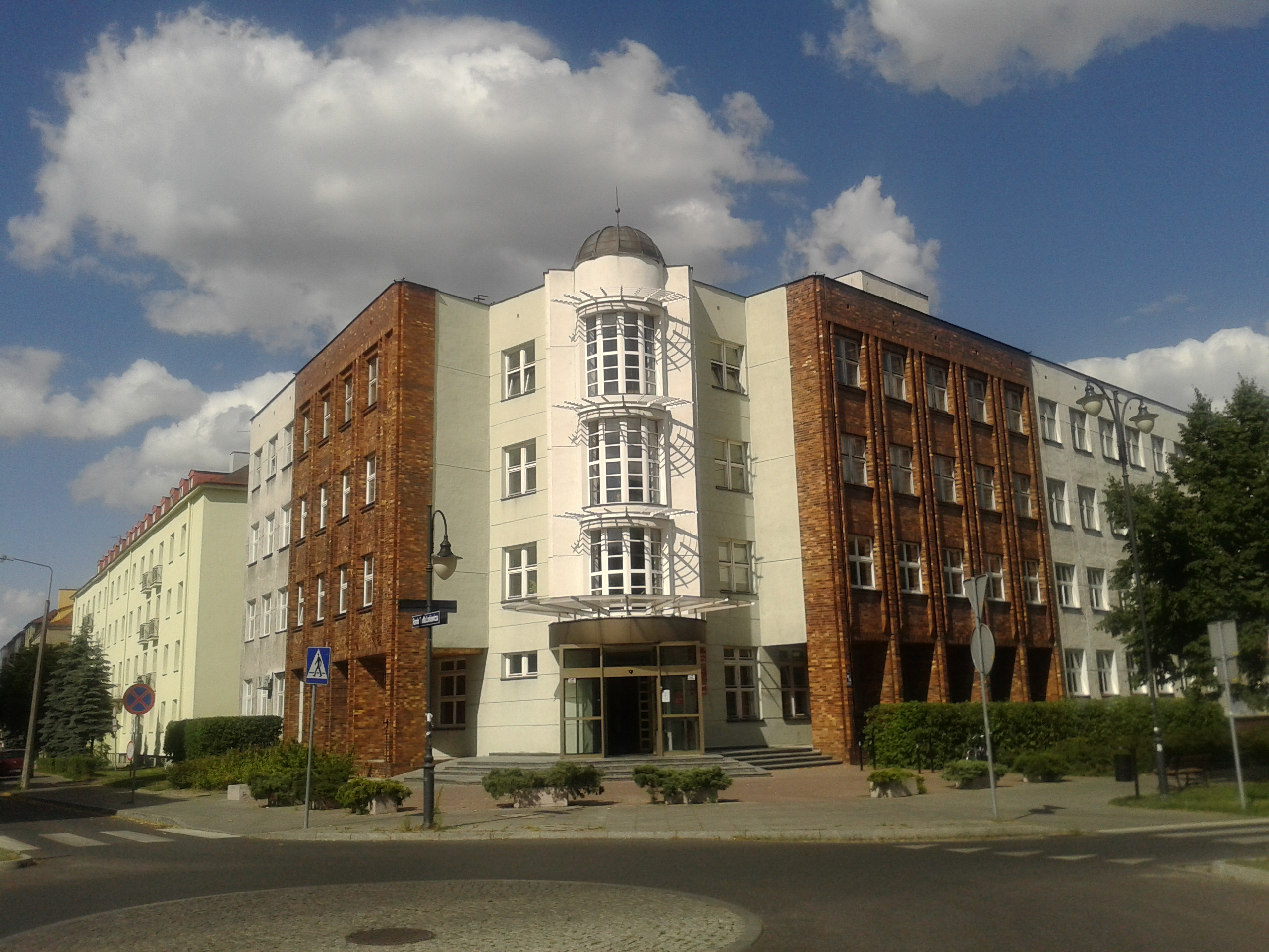 Budynek urzędowy przy rondzie imienia Teofila Lorkiewicza - ulica Adama Mickiewicza 10/16 w Toruniu Zakład Ubezpieczeń Społecznych Oddział w Toruniu/ Urząd Statystyczny w Bydgoszczy Oddział w Toruniu/ Sąd Rejonowy w Toruniu V Wydział gospodarczy/ Sąd Rejonowy w Toruniu XI Wydział Cywilny